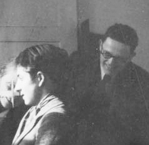 Deutsch